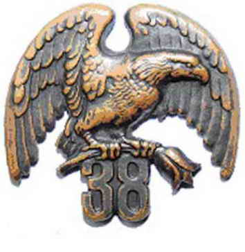 черный орел